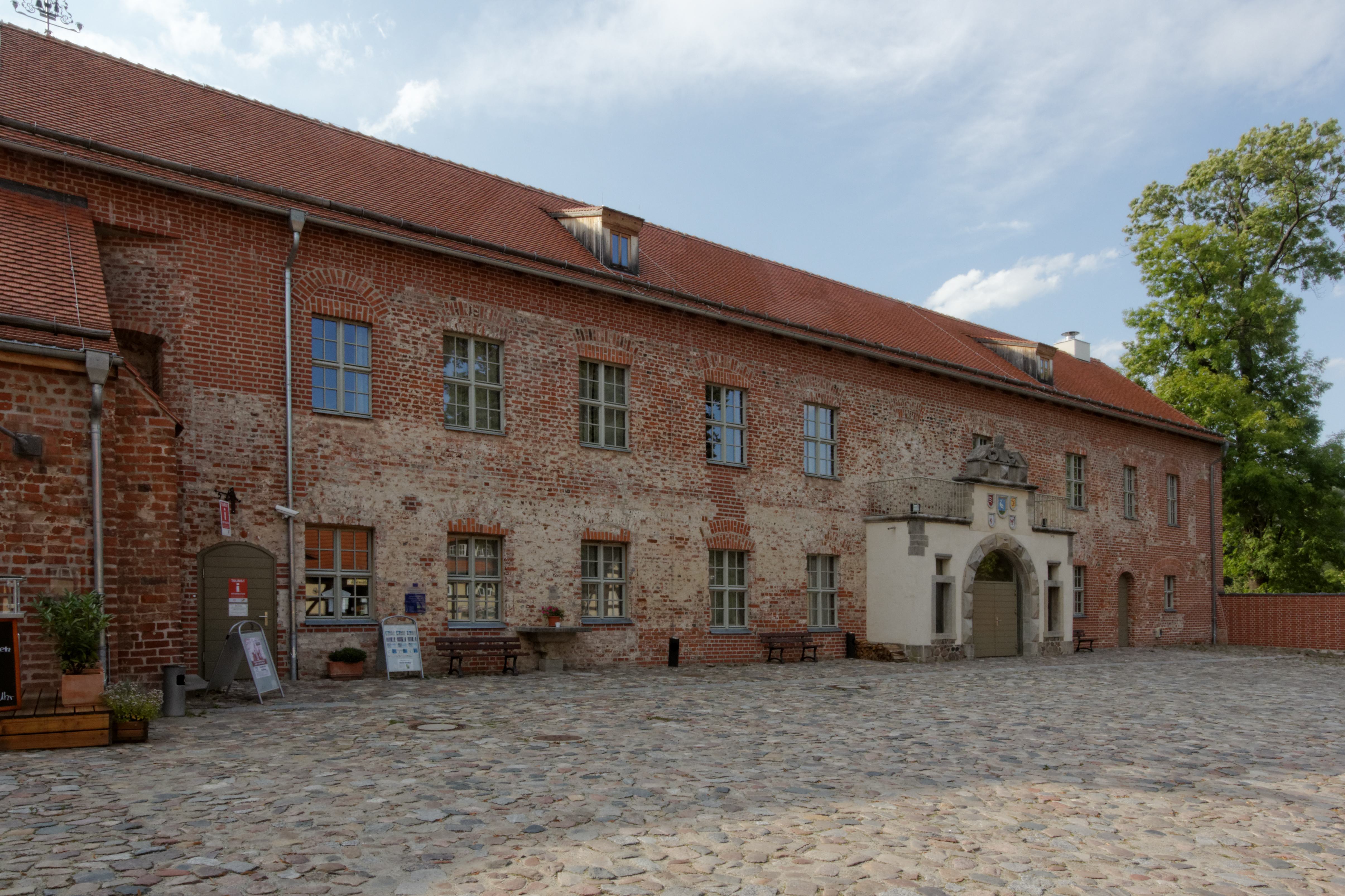 Palas der Burg Storkow, restauriert 2005–2009.